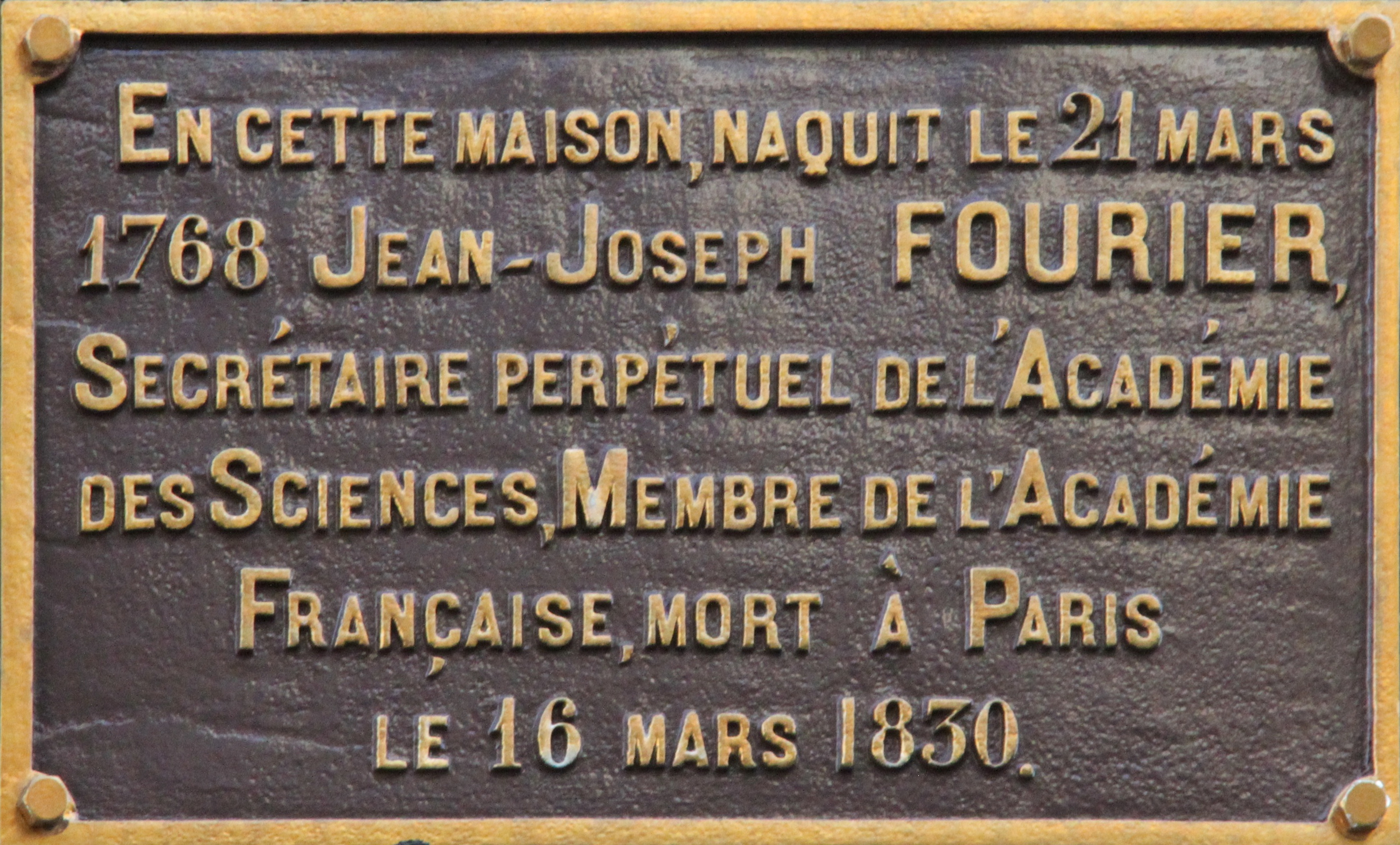 Plaque commémorative sur la maison natale du mathématicien et physicien français Joseph Fourier (1768-1830), Auxerre. Sur cette plaque, la date de décès est fautive, il faut lire '16 mai 1830'.